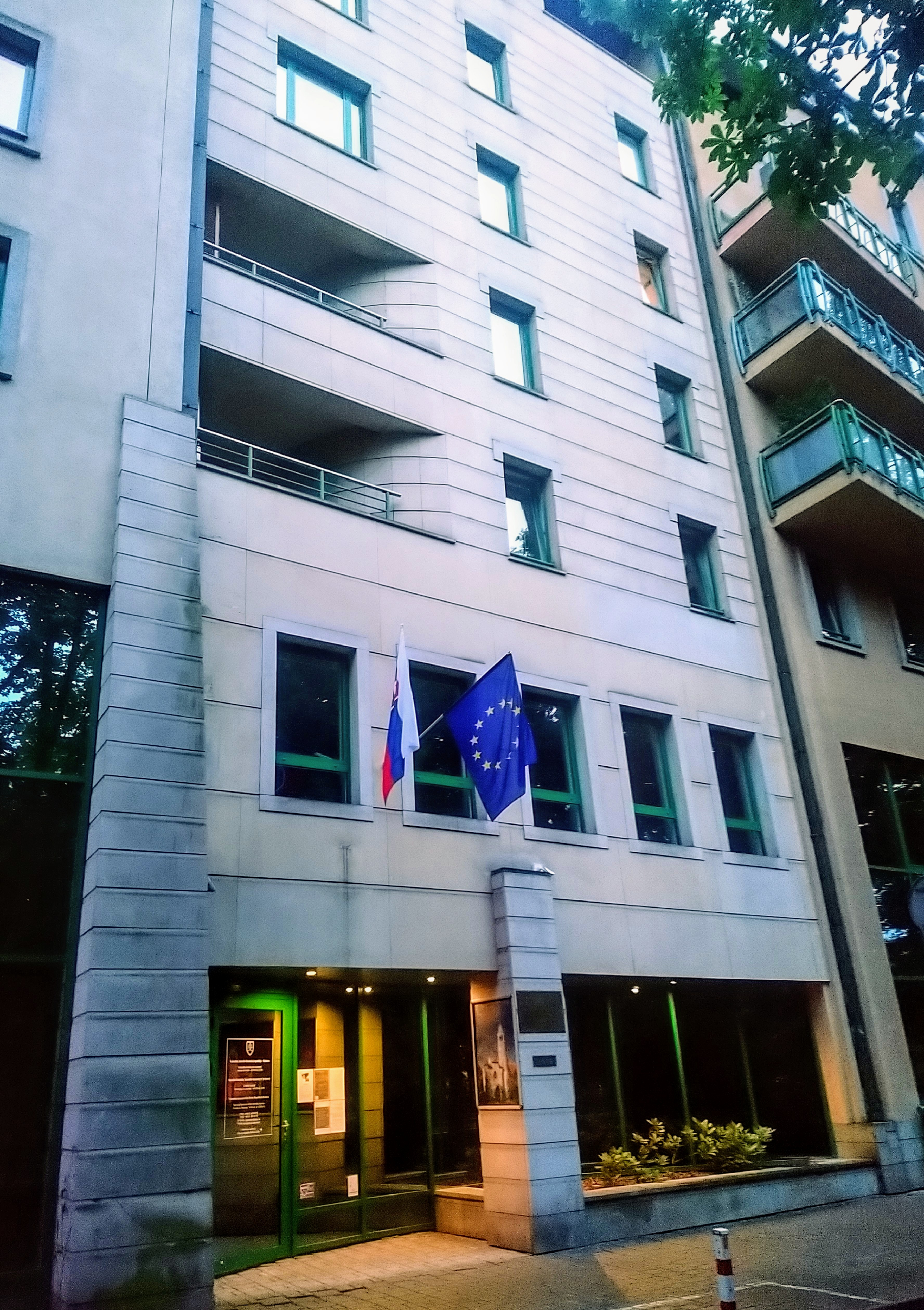 Konsulat Generalny Republiki Słowackiej w Krakowie